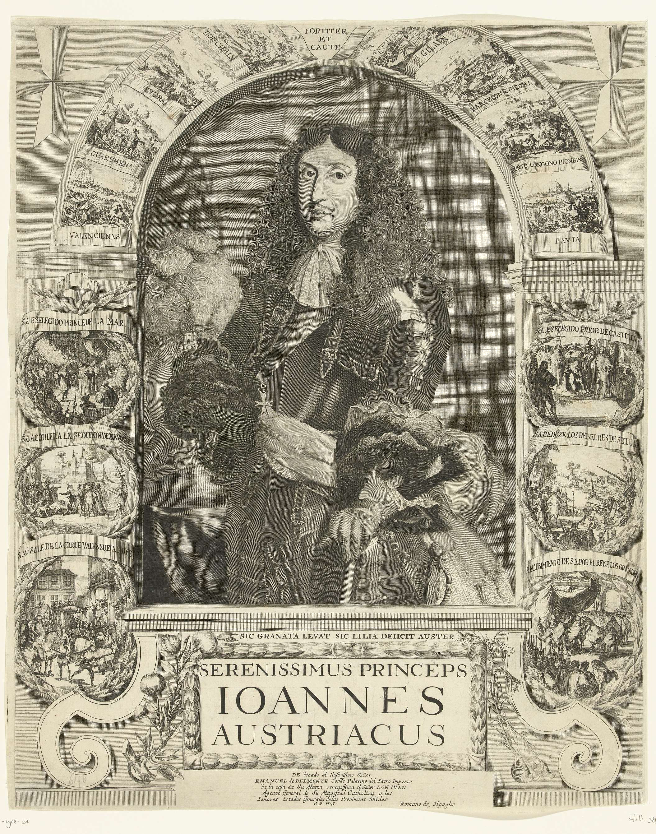 Retrato de Juan José de Austria. Dedicado a "Emanuel de Belmonte Conde Palatino del Sacro Imperio, de la casa de su alteza sereníssima el señor DON IUAN Agente general de su majestad cathólica a los señores Estados Generales de las Provincias unidas"